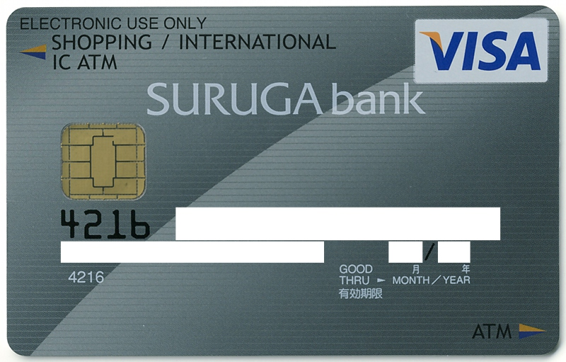 スルガICキャッシュカード(Visaデビット機能付き)＝スルガ銀行VISAデビットカード